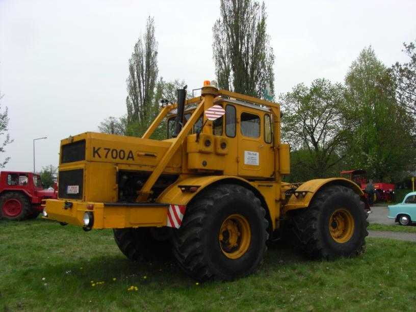 K-700A in Hartmannsdorf.